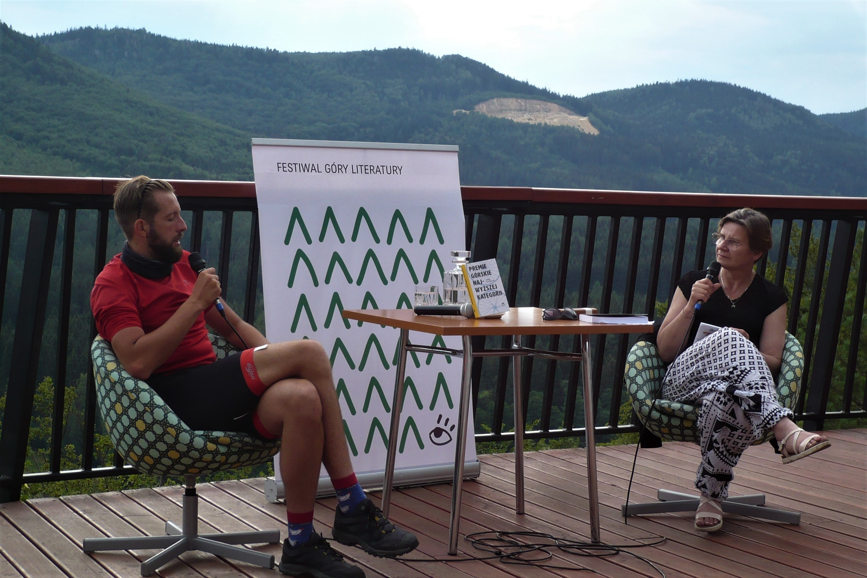 Jakub Kornhauser i Magdalena Rabizo-Birek, VI Festiwal Góry Literatury, Radków, taras na Górze Guzowatej, 15.07.2020